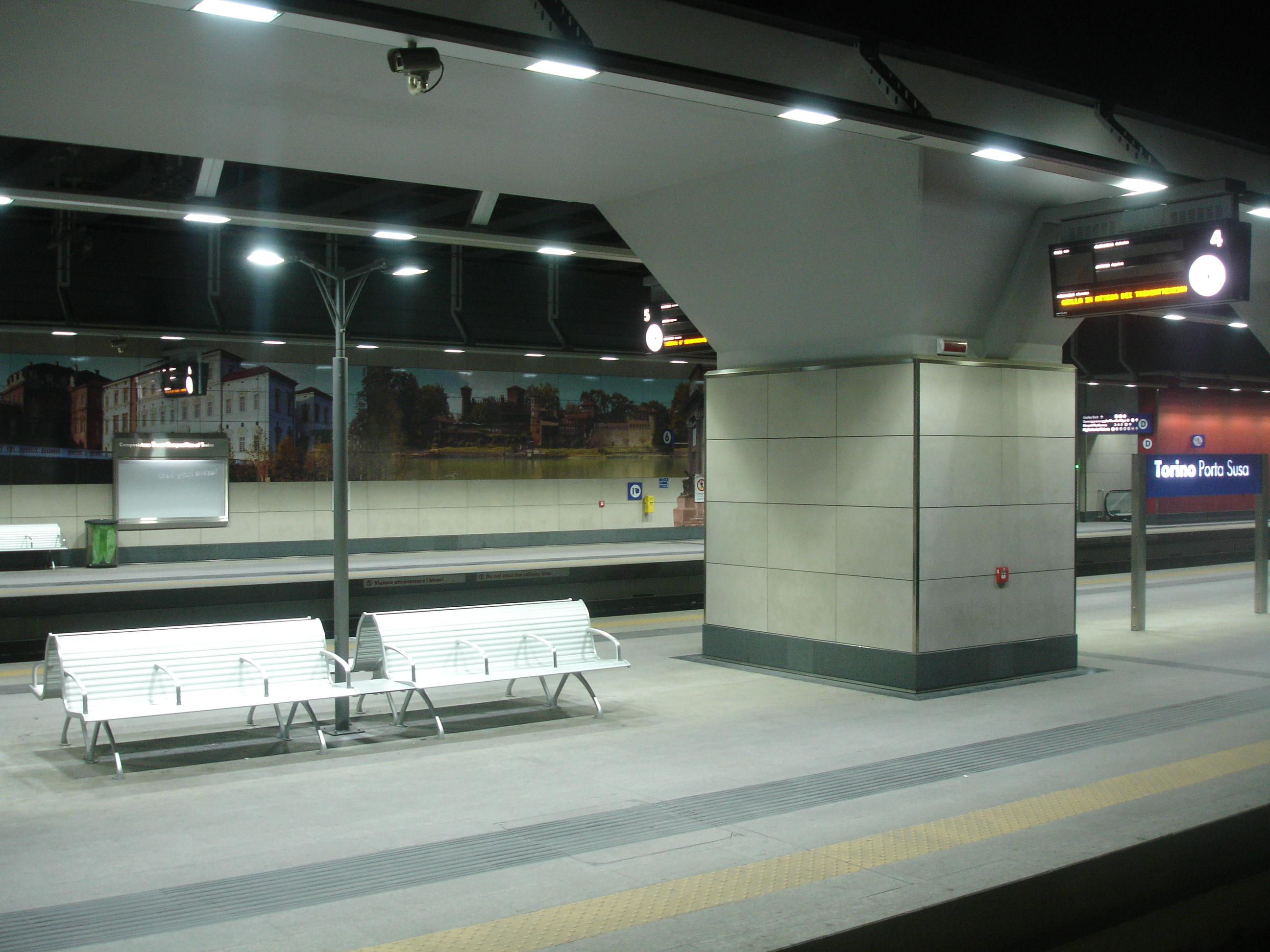 Una vista della stazione sotterranea di Torino Porta Susa.